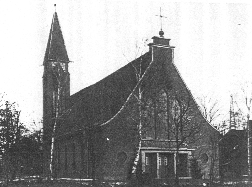 katholische Adalbertkirche (Erweiterungsbau der Adalbertkapelle) in Königsberg-Amalienau, Ostpreußen, erbaut 1932